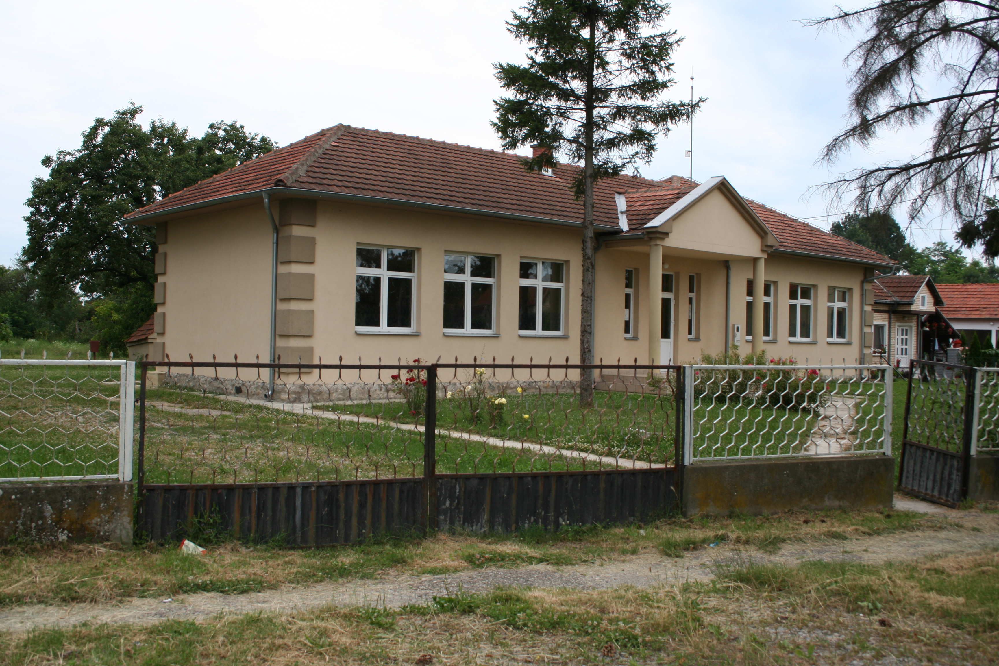 Zgrada škole, Duvanište